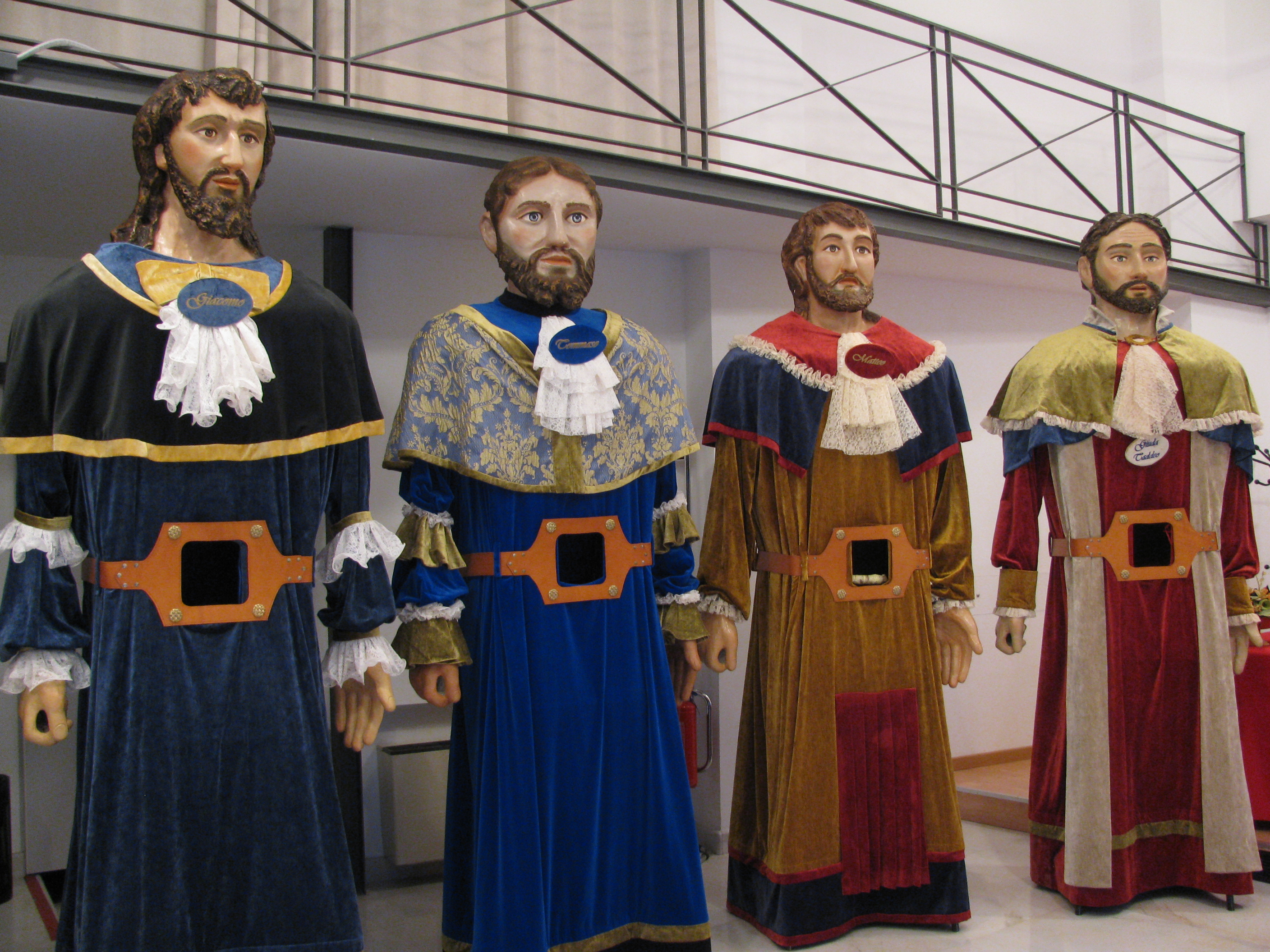 Statue rappresentanti gli apostoli: Giacomo, Tommaso, Matteo, Giuda Taddeo